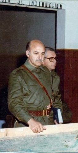 El por entonces General de Brigada José Antonio Vaquero